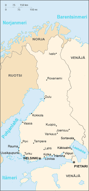 Suomen suuriruhtinaskunnan kartta Based on CIA World Factbook map of Finland